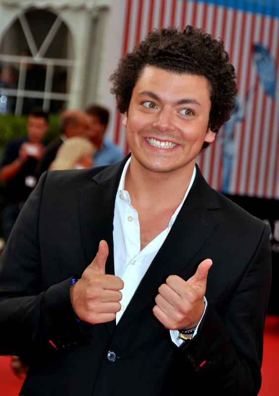 Kev' Adams au festival de Deauville.